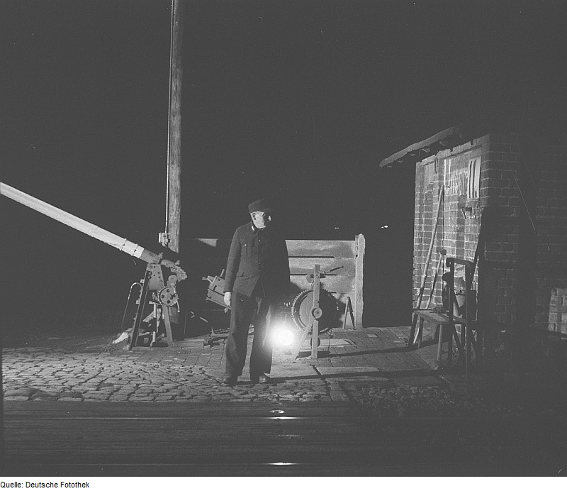 Original image description from the Deutsche Fotothek Nachtansicht eines Bahnhofs mit Schrankenwärter